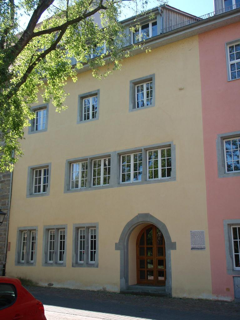 Geburtshaus von Ambrosius Blarer in Konstanz, damals Münstergasse, heute Katzgasse